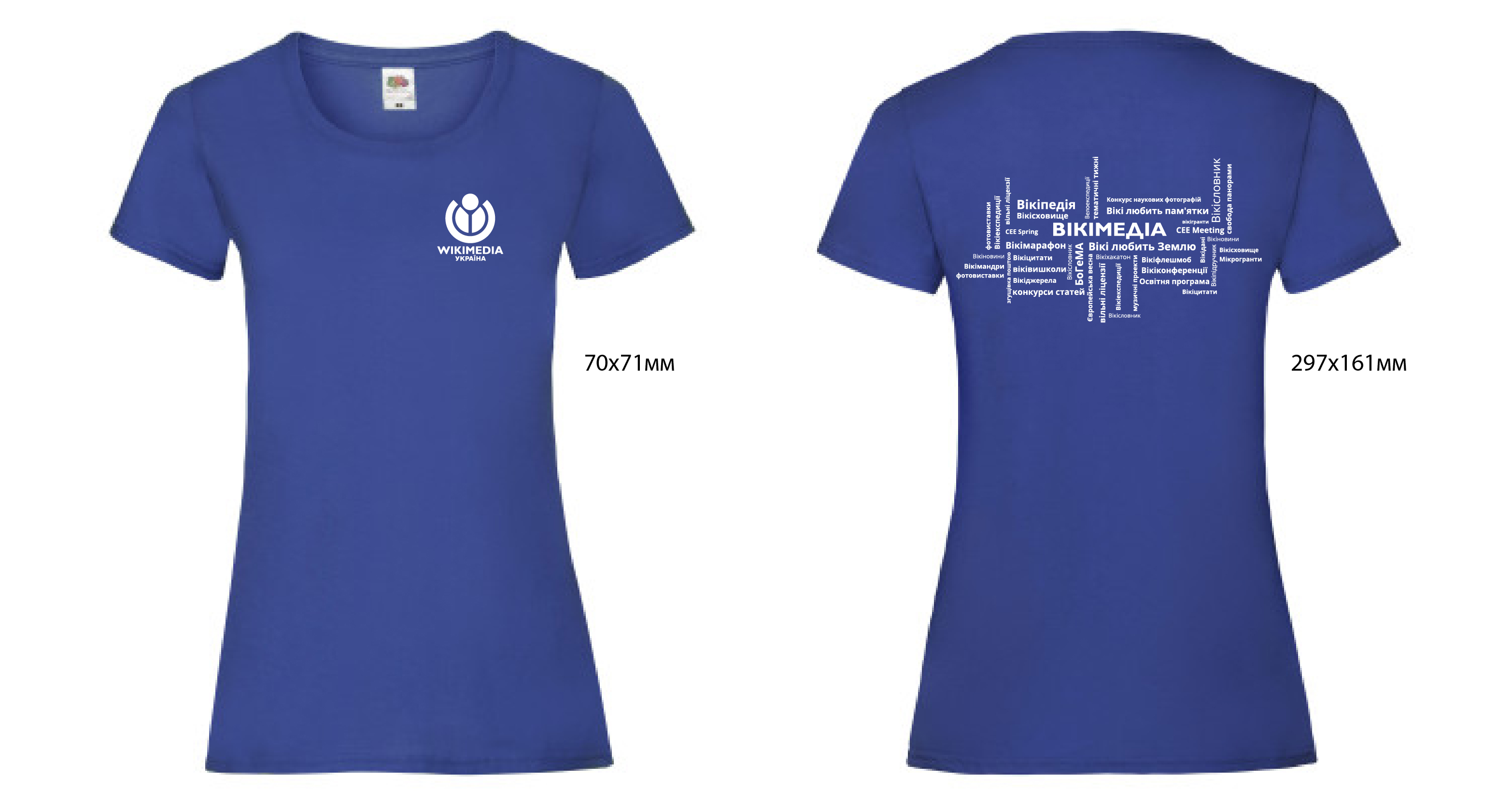 Футболка